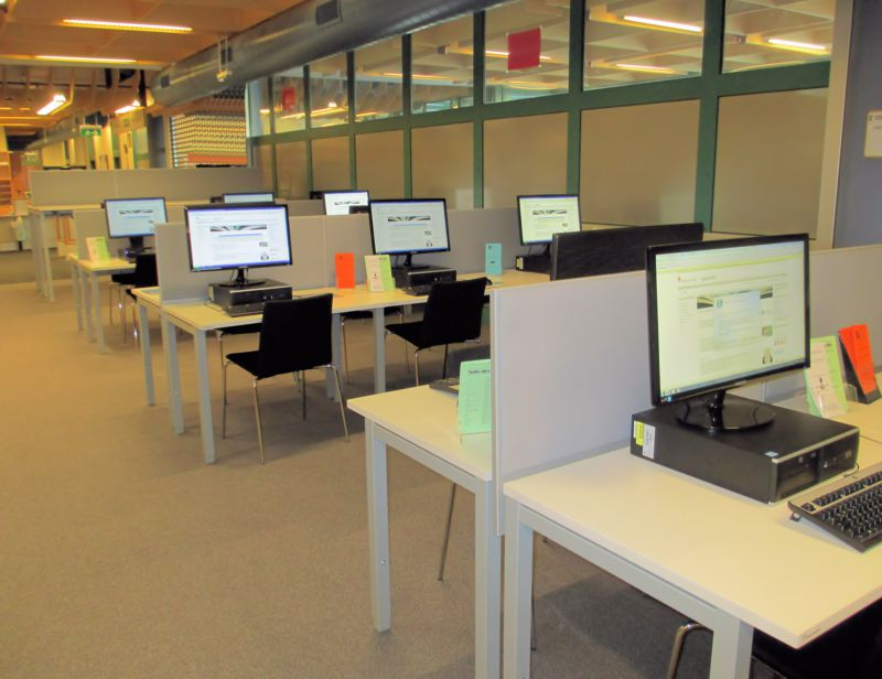 Universitätsbibliothek Linz, Hauptbibliothek, Recherchebereich